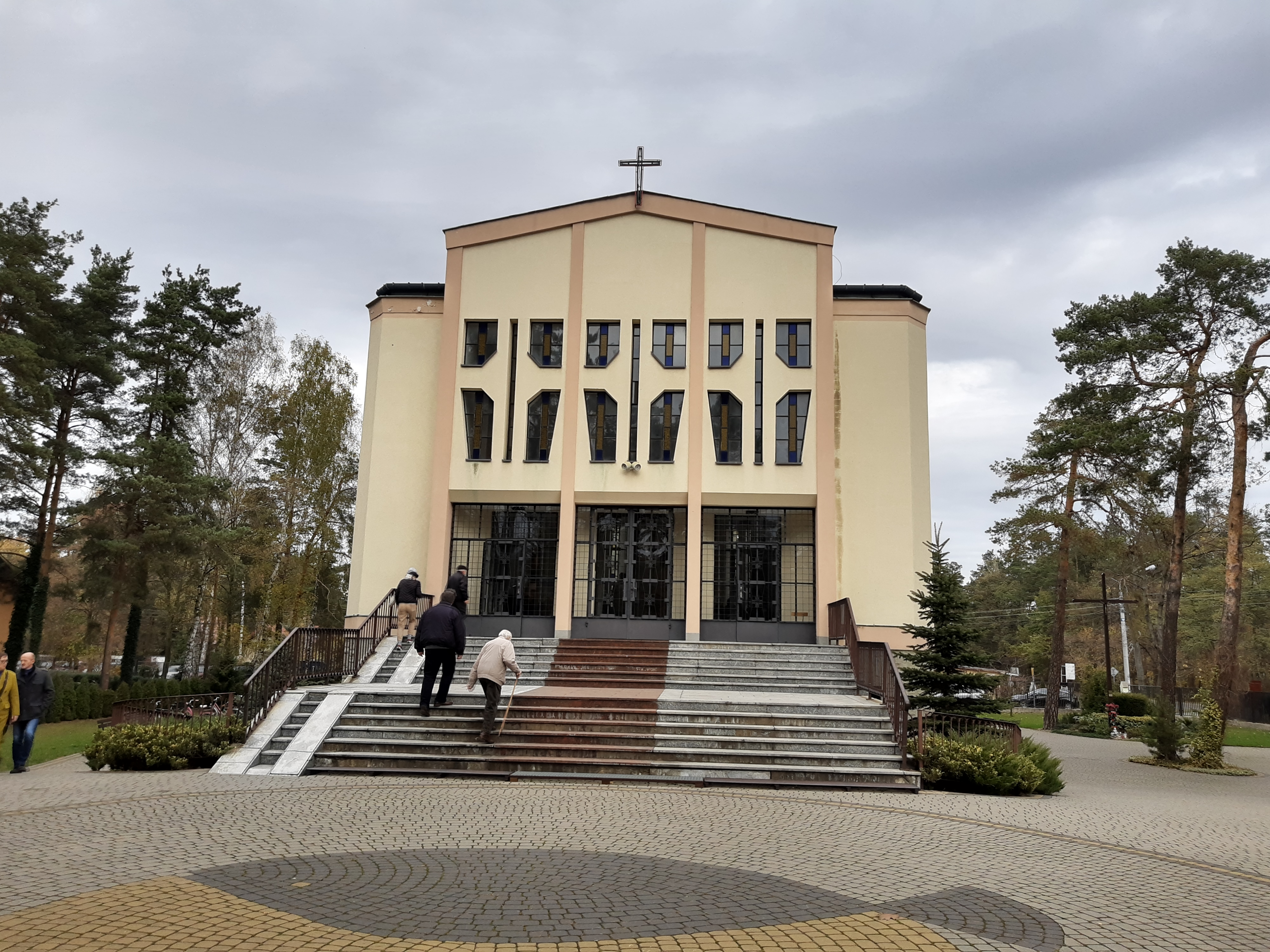 Międzyborów (gm. Jaktorów, pow. Grodzisk Mazowiecki) - kościół Przemienienia Pańskiego